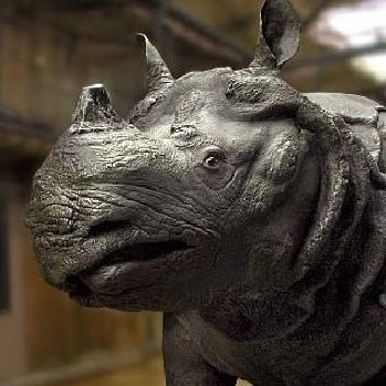 Rhinocéros de Louis XV (Paris, Museum national d'histoire naturelle)